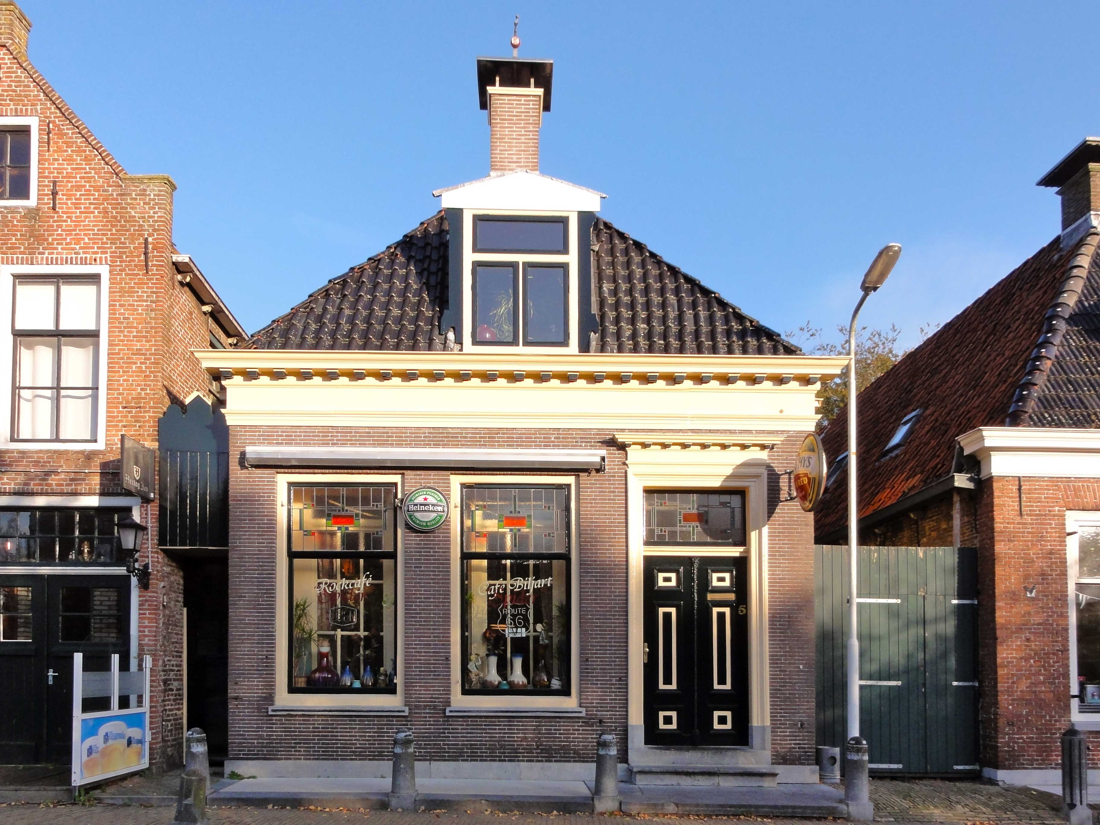 Meerweg 5 Balk